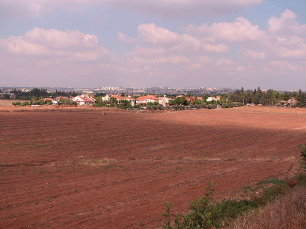 מושב בן שמן, מצולם מצומת כביש 443 וכביש 1